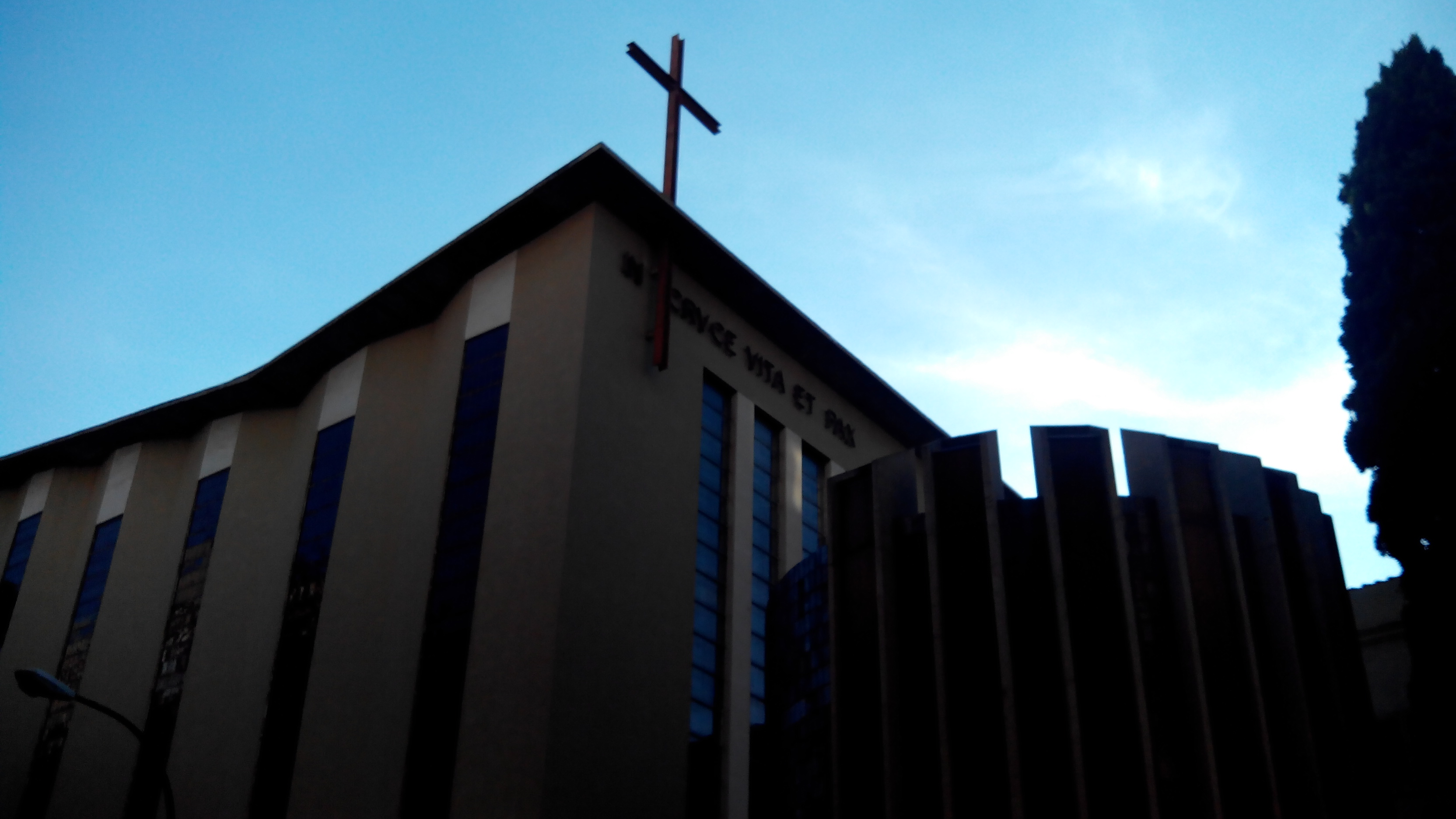 Sant Alonso Rodríguez, Palma